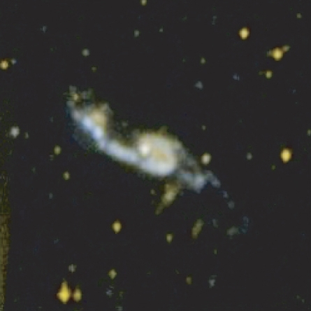 NGC 6845